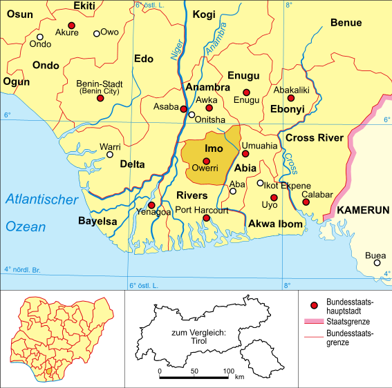 Politische Karte Nigerias (Bundesstaat Imo hervorgehoben)